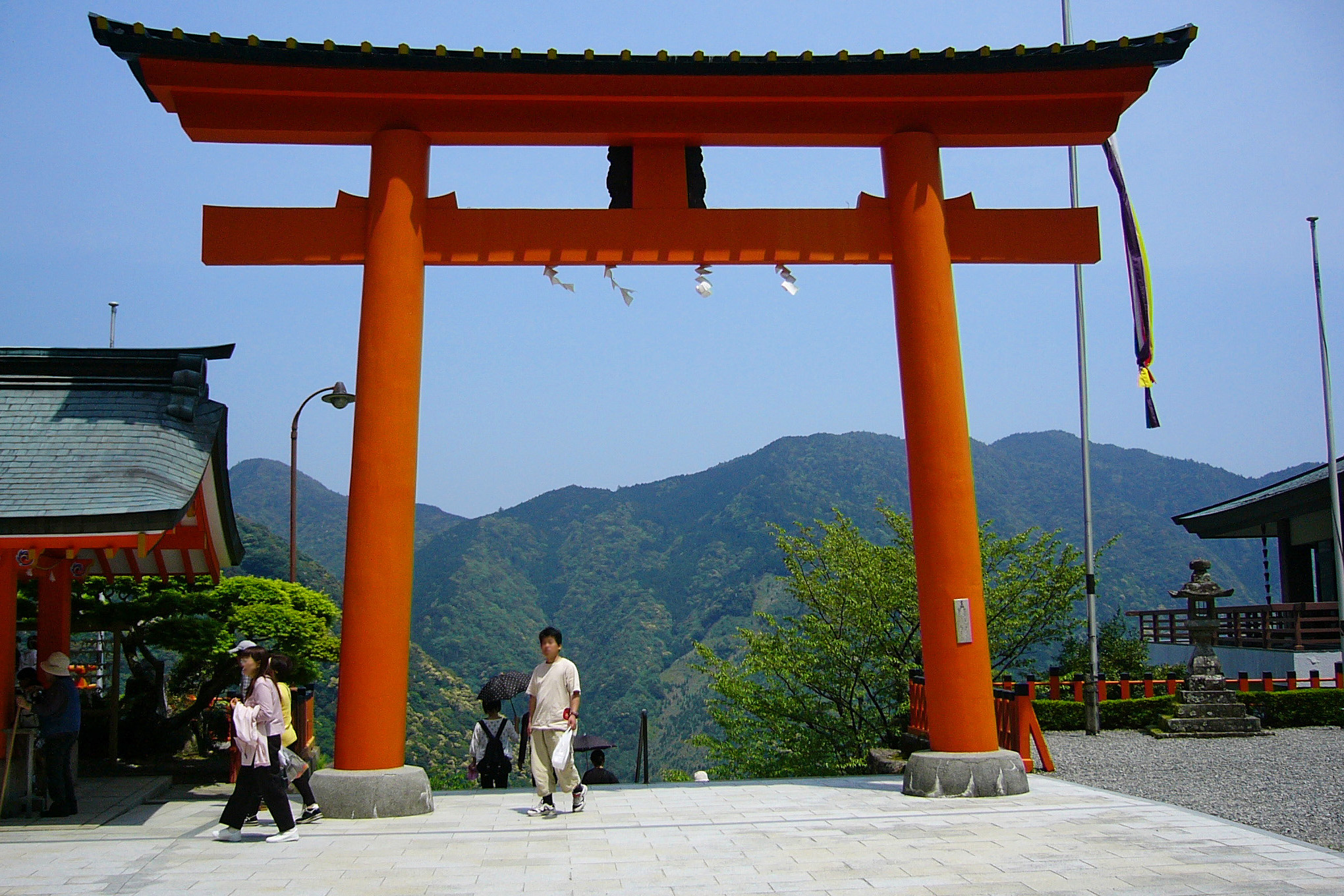 Kumano-Nachi-shrine in Nachikatsuura, Wakayama Prefecture, Japan